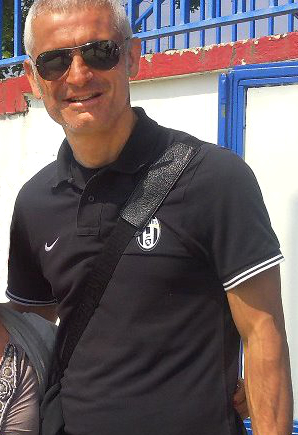 Fabrizio Ravanelli, allenatore di calcio ed ex calciatore